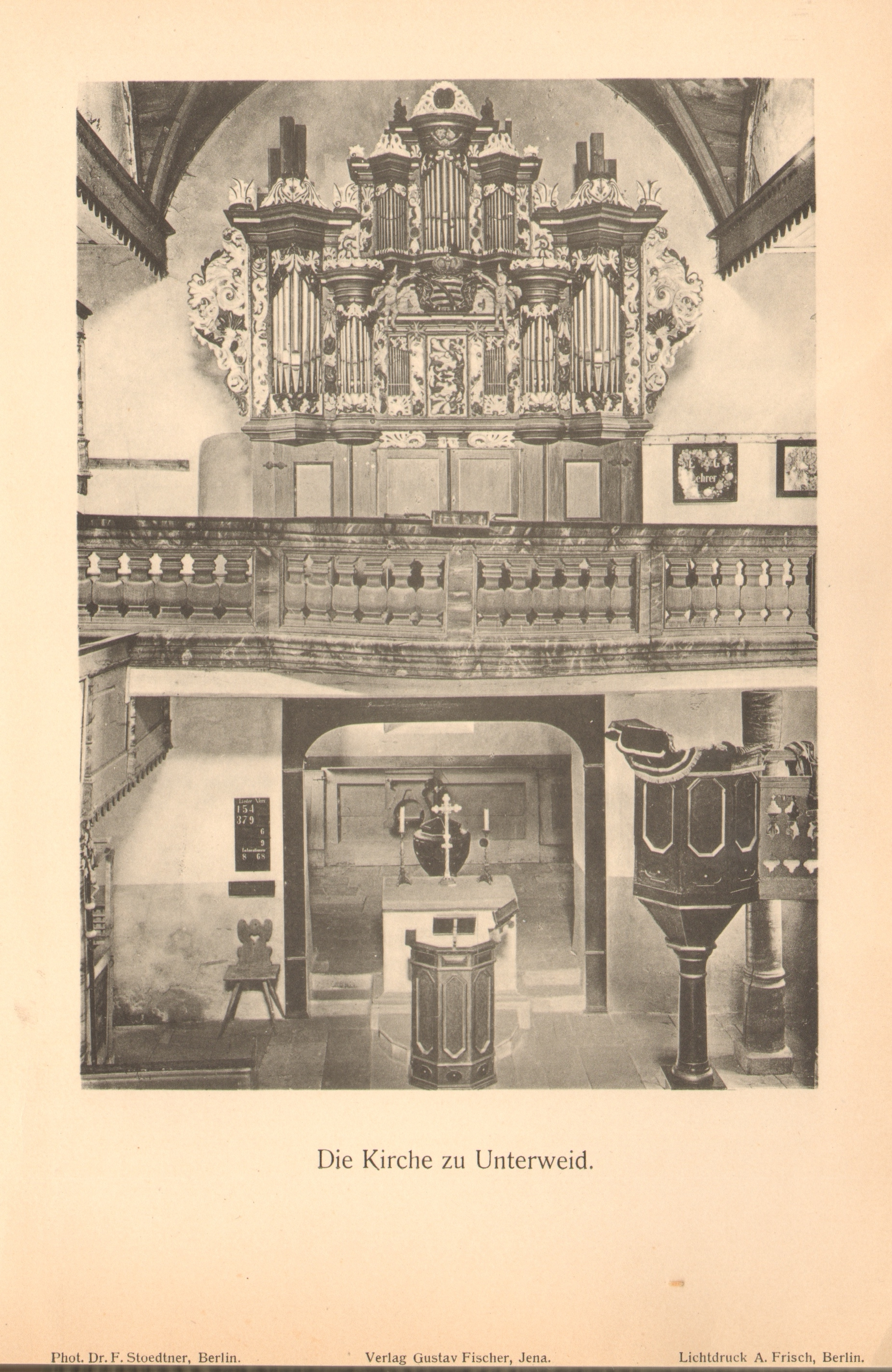 Ansicht des Altars der Kirche in Unterweid/Rhön